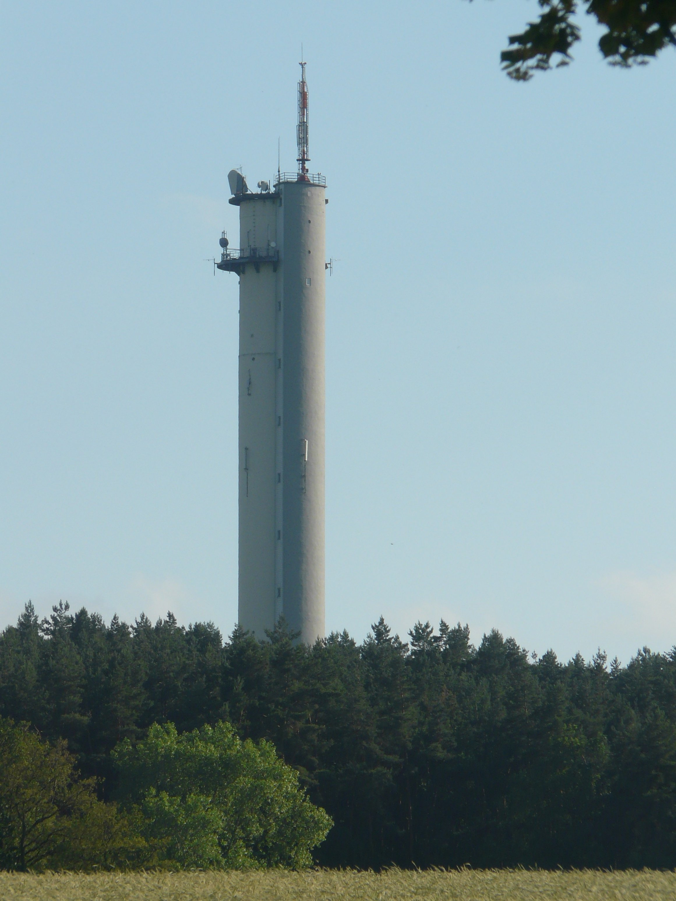 Das Bild zeigt den zu DDR - Zeiten erbauten und unter Denkmalschutz stehenden asymmetrischen Fernmeldeturm in Rhinow im Havelland